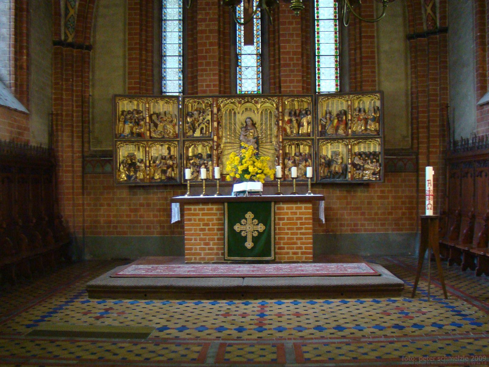 Marienaltar der Marienkirche in Gnoien